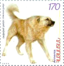 Армянская почтовая марка; Армянский гампр; 1999.